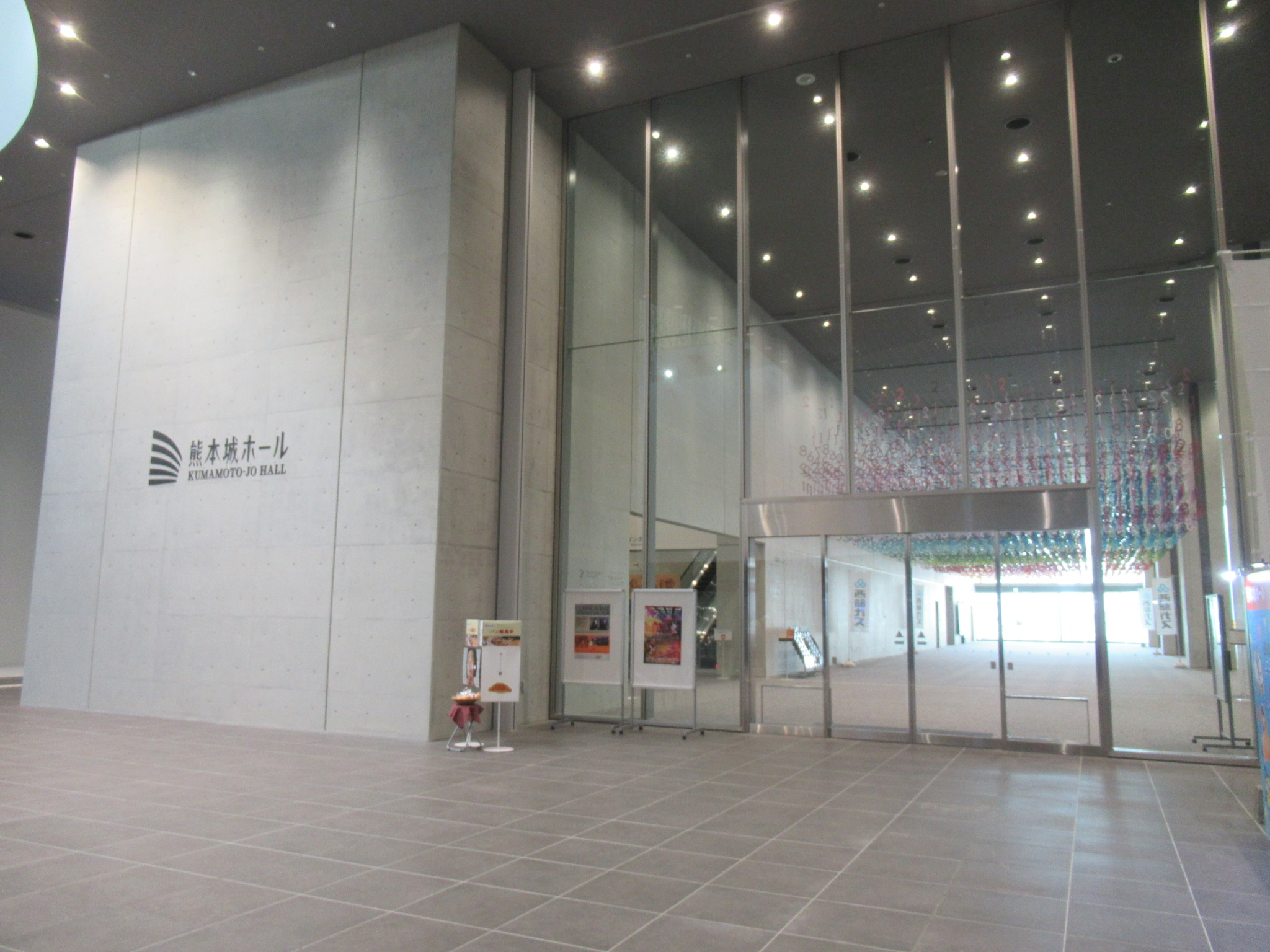 熊本城ホール エントランスロビー